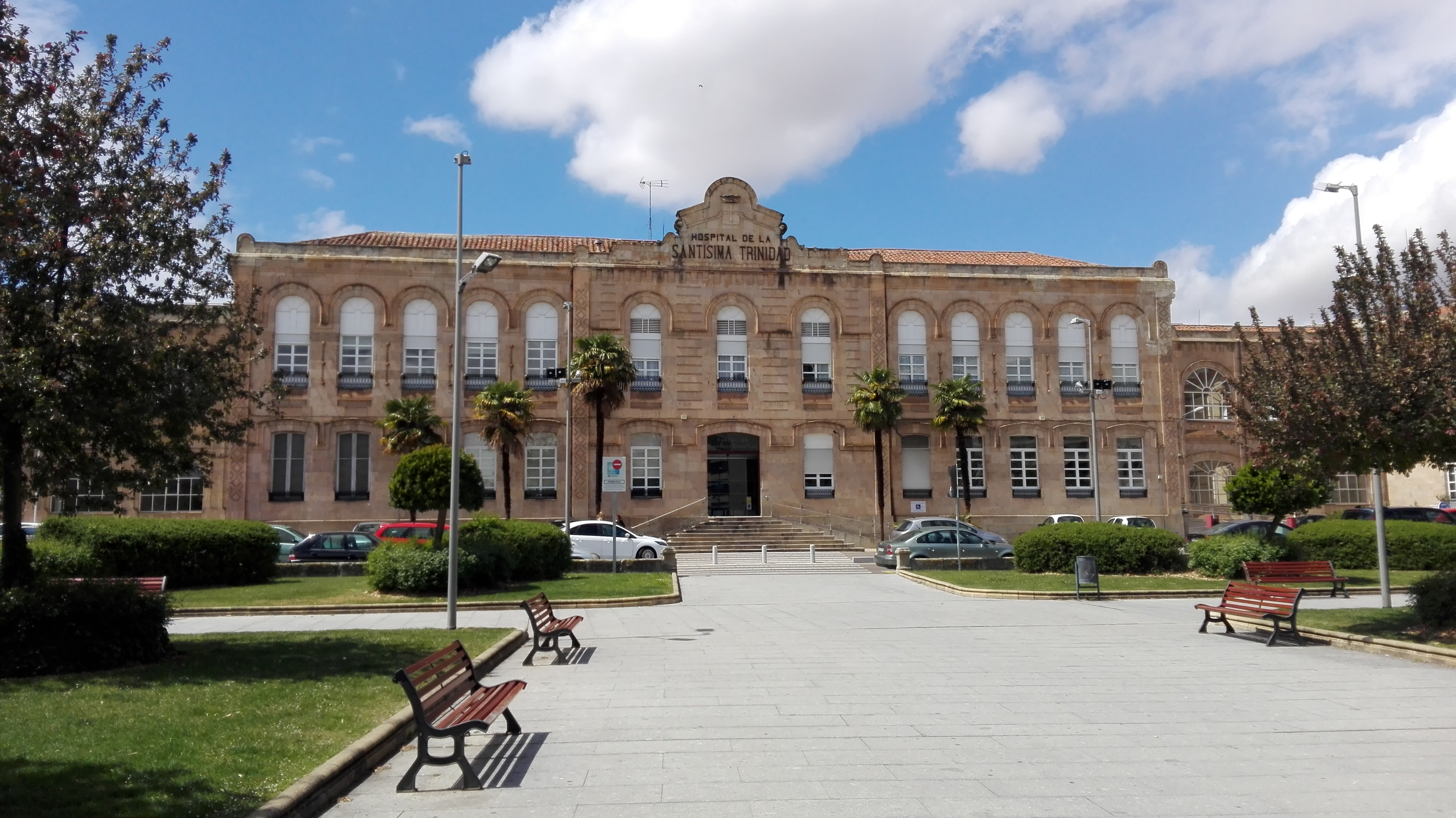 المستشفى العام الثالوث المقدس في مدينة سلامنكا الإسبانية.